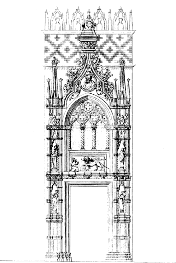 Incisione tratta da: "Il Palazzo Ducale di Venezia illustrato da Francesco Zanotto, con incisioni, Venezia 1841"